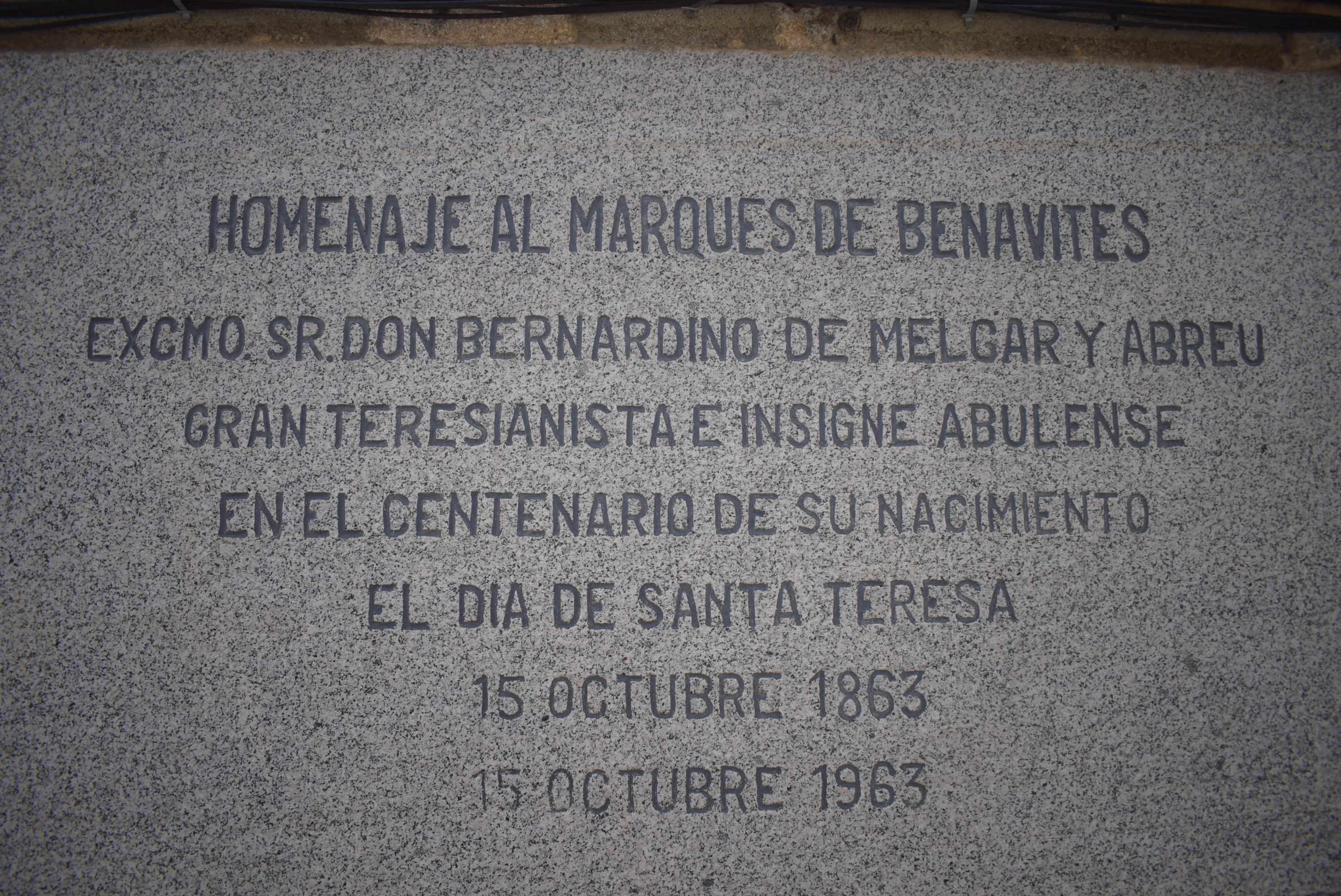 Placa de granito grabada con el homenajeando a Bernardino de Melgar y Abreu, marqués de Benavites, emplazada en la calle de Las Madres, Ávila